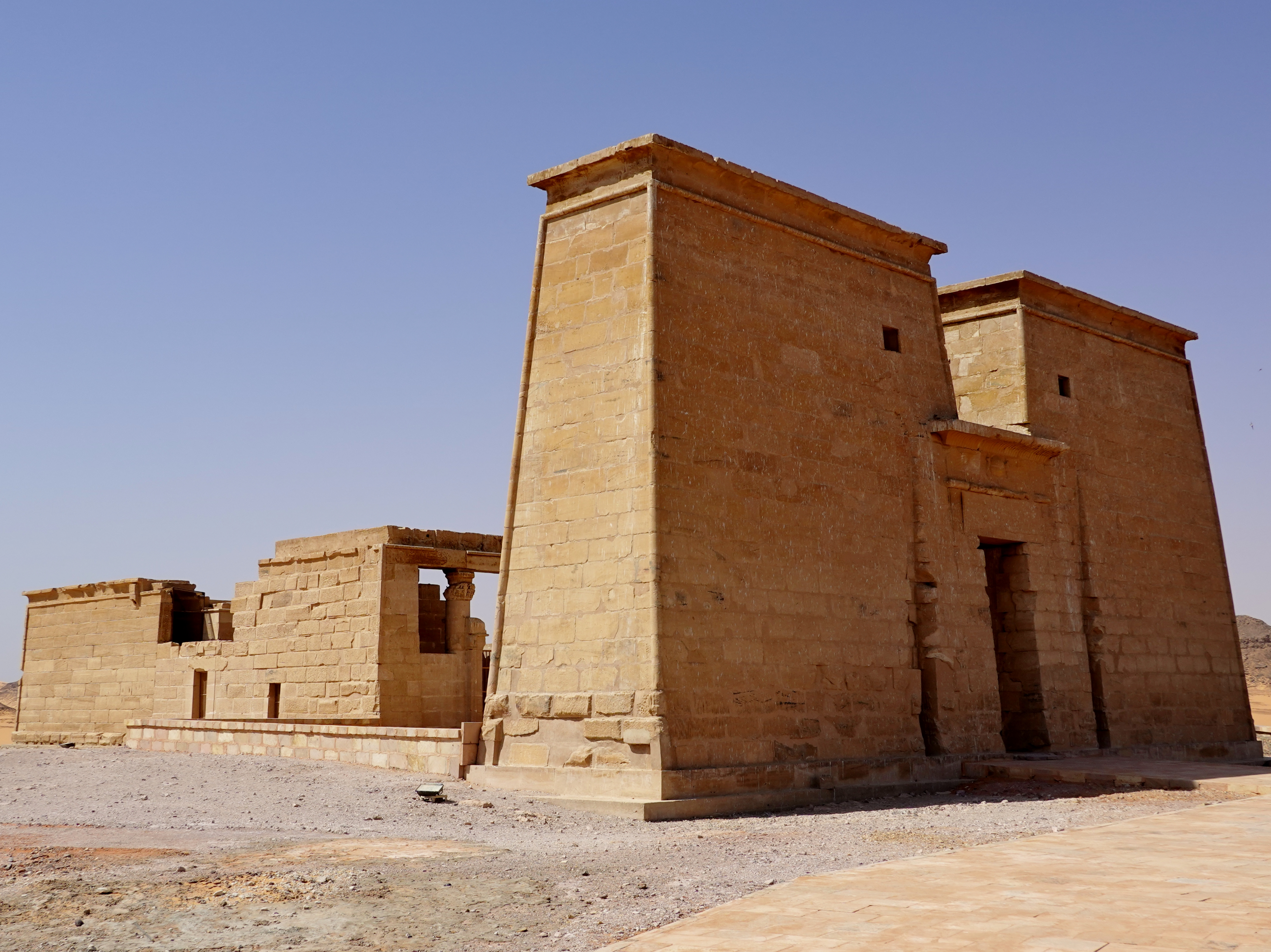 Ostseite des Tempels von Dakka am Nassersee, Ägypten